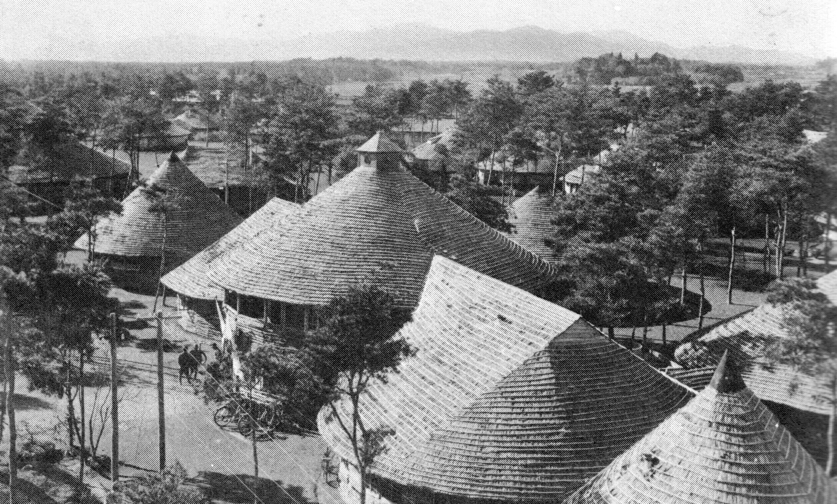 満蒙開拓青少年義勇軍の内原訓練所の本部。